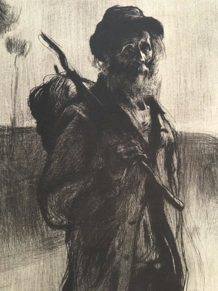 Edgar Chahine - Le Chemineau